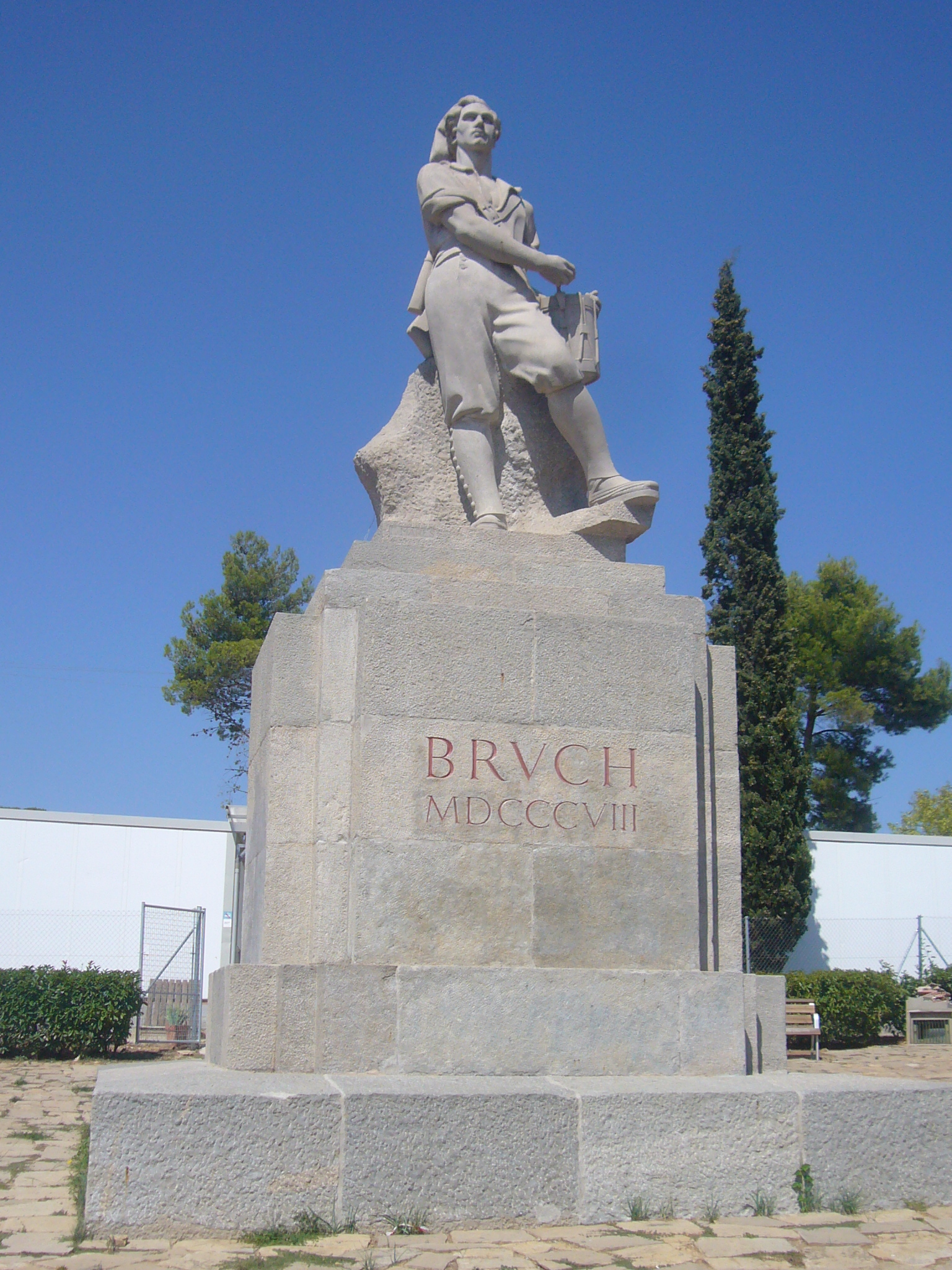 Monument al Timbaler del Bruc